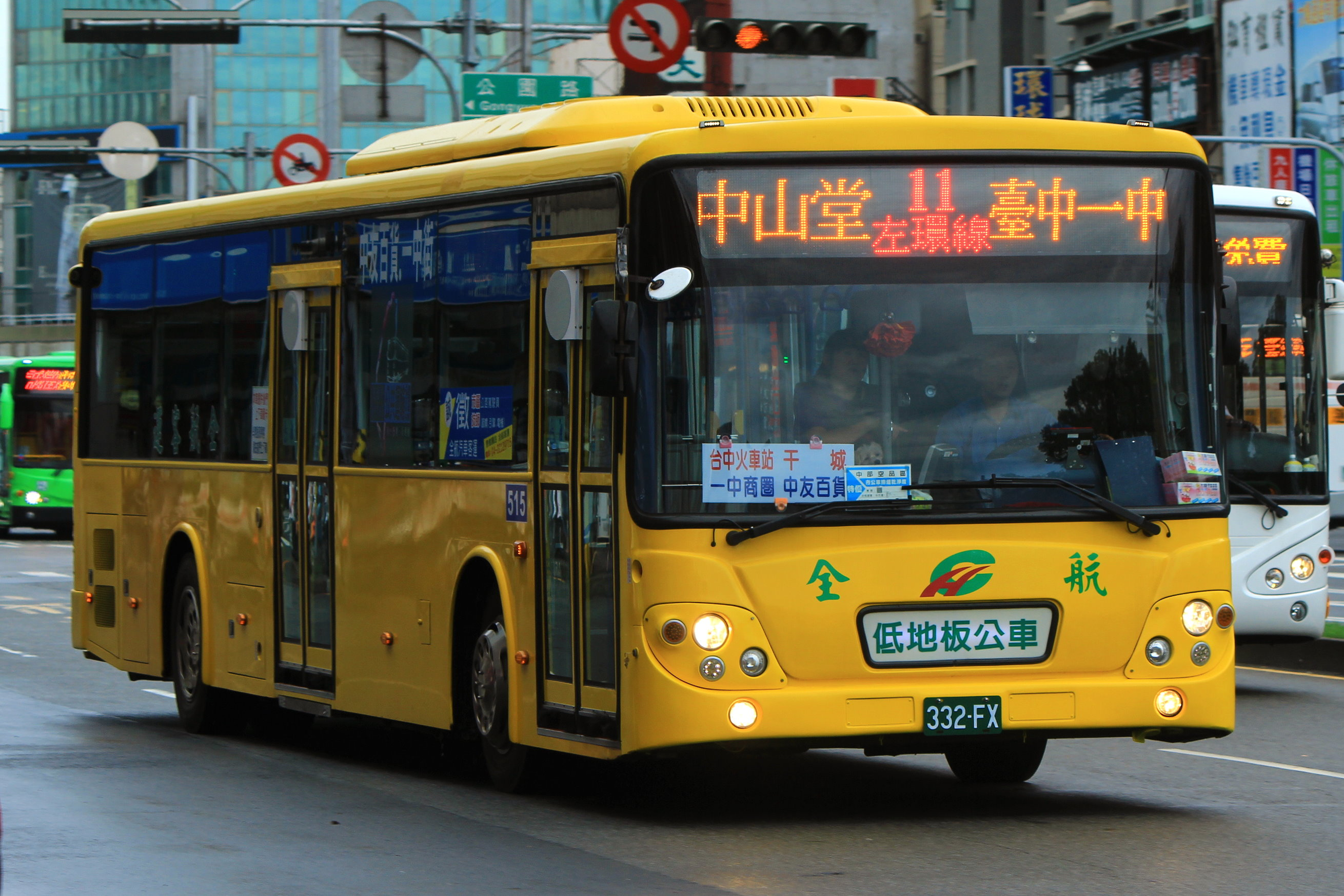 11路 干城站